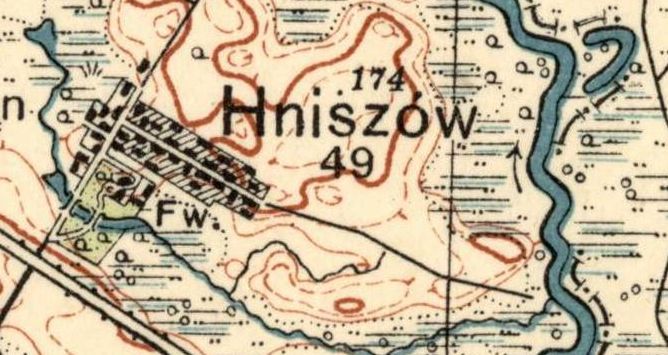 Hniszów na mapie Wojskowego Instytutu Geograficznego z 1933 r.